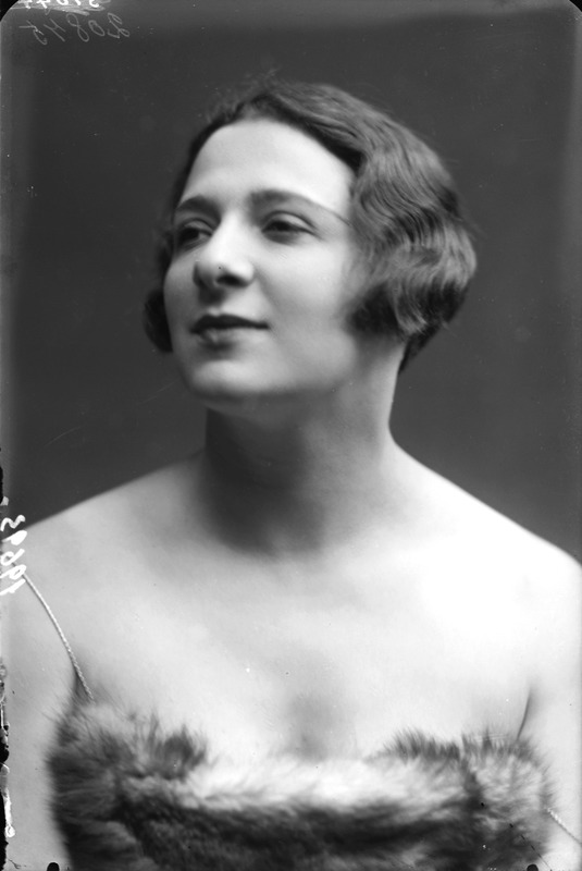 Marga Cella